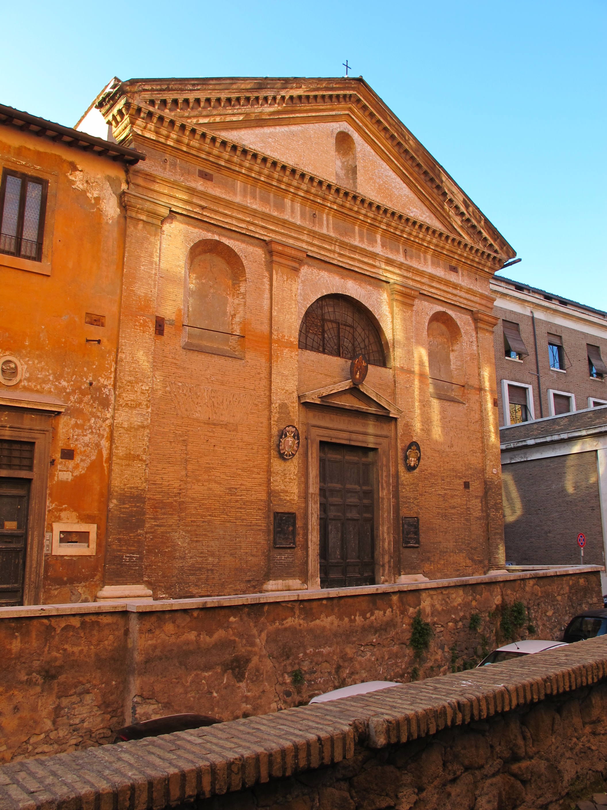 San giovanni decollato, facciata